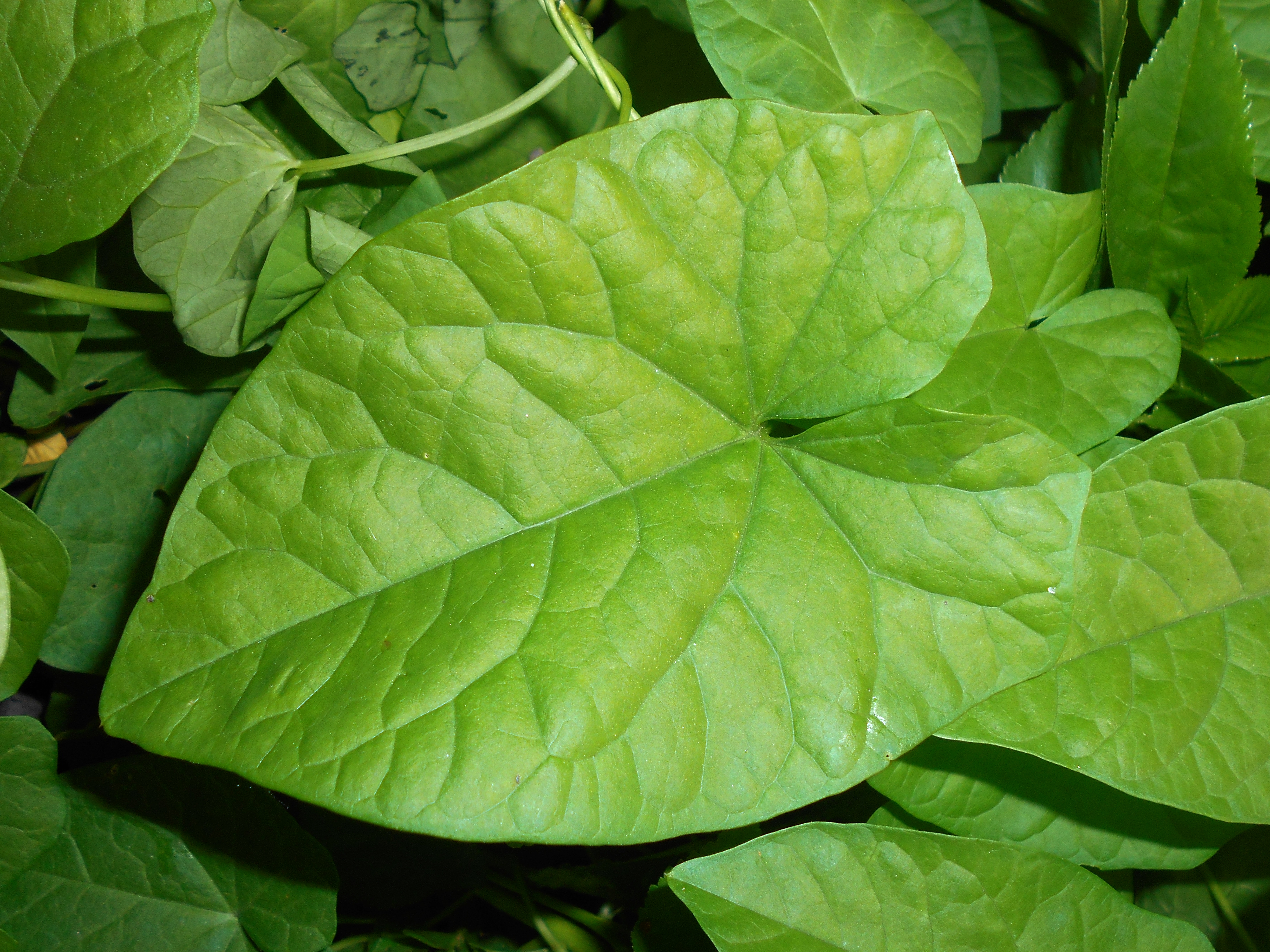 Kielisznik zaroślowy (Calystegia sepium).